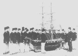 Mekteb-i Fünun-ı Bahriye-i Şahane'de Bir Ders (Bahriyeli Ali Sami'nin 1900'lü yıllarda çektiği bir fotograf)